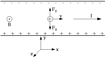 אילוסטרציה של אפקט הול (עבור נושאי מטען חיוביים) רישיון נוצר על ידי משתמש:Adiel lo